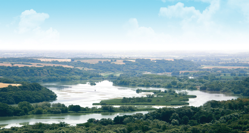 Riserva Naturale - Veduta del Lago di Nazzano originatosi dall'ampliamento dell'alveo del Tevere in seguito alla costruzione da parte dell'Enel di una diga tra il 1953 e il 1955.